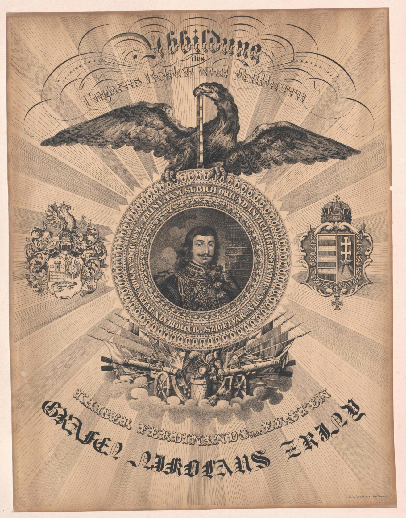 Abbildung ungarns helden und feldherrn Zrinski, Nikolaus Graf (1620 - 1664) Porträt, Statthalter